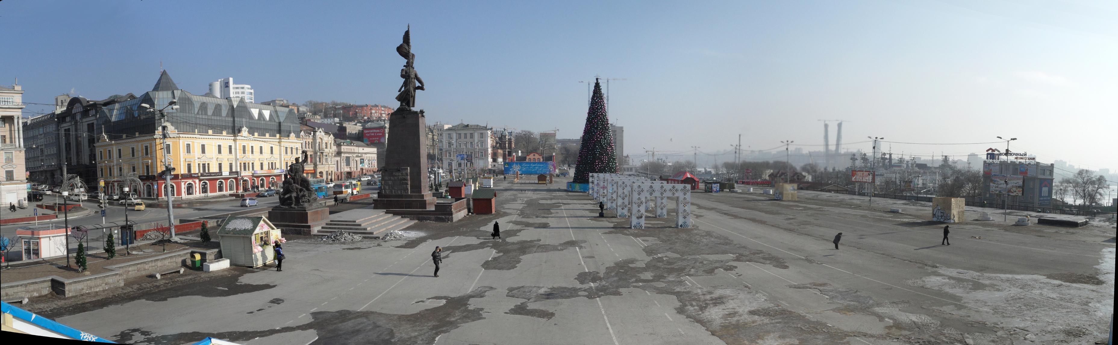 Владивосток, площадь, новый год 2011